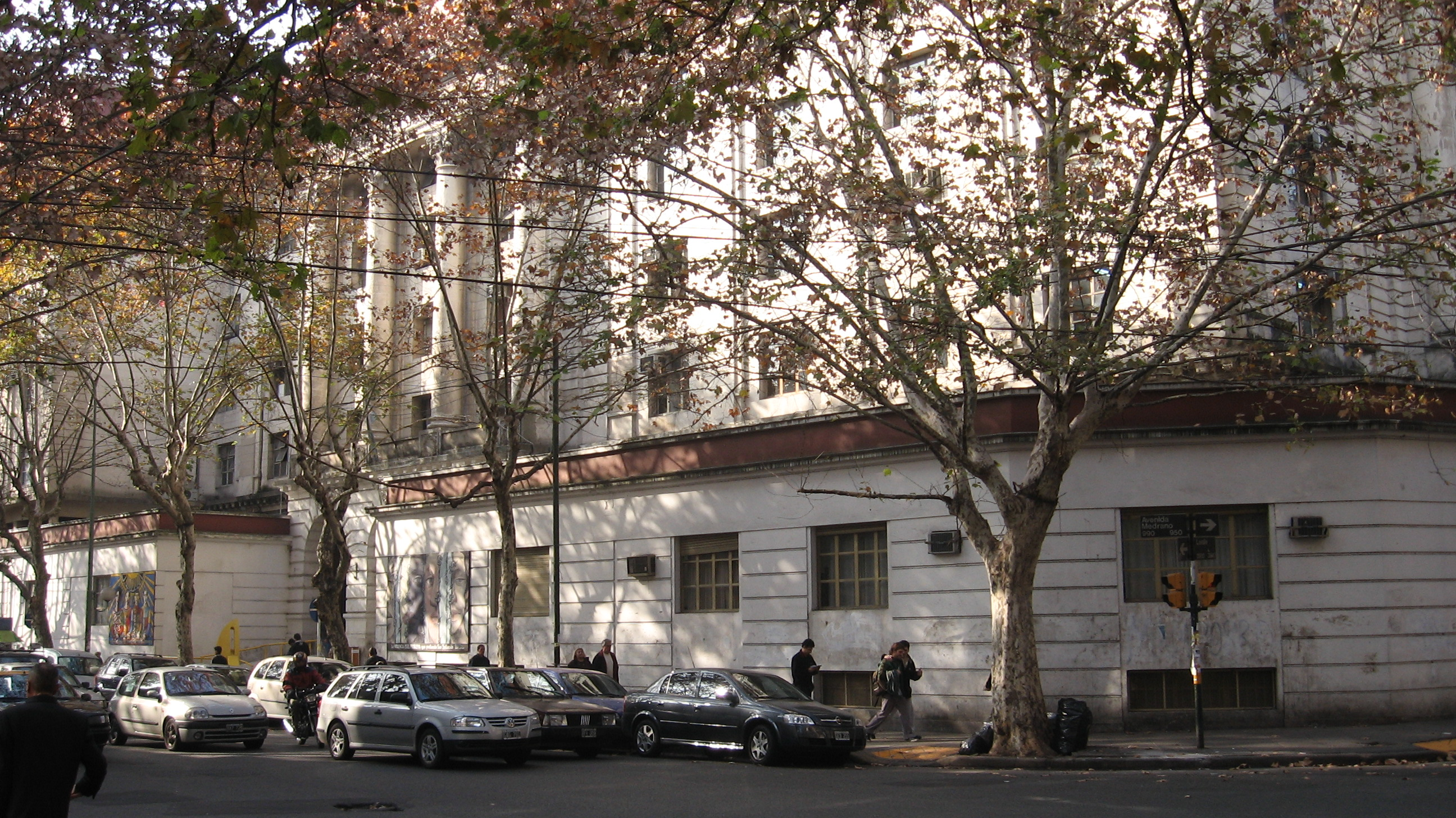 Universidad Tecnológica Nacional, Facultad Regional Buenos Aires, situada en Medrano Córdoba, ciudad de Buenos Aires, Argentina.